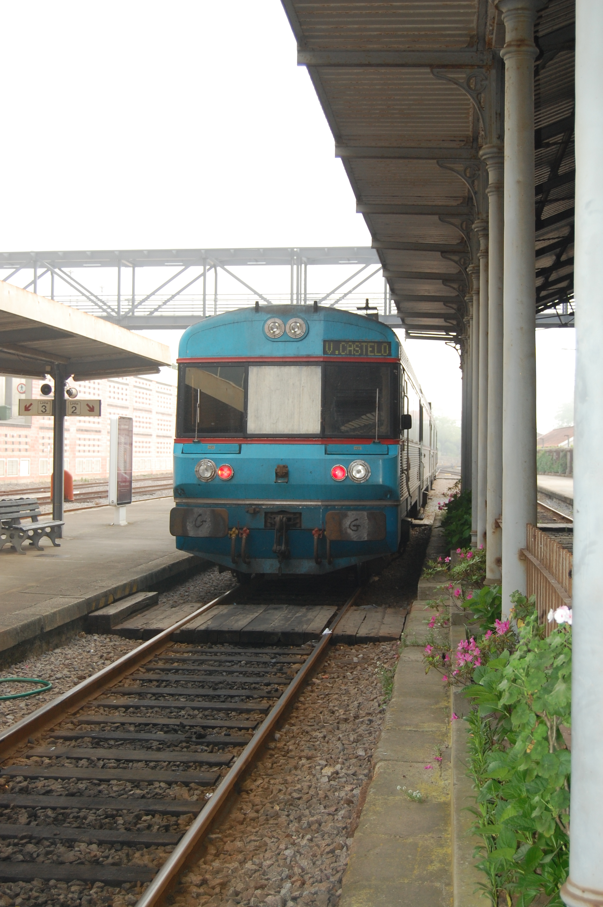 Estação de comboios de Viana do Castelo.